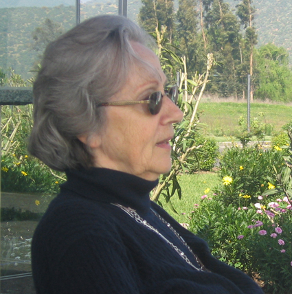 Fotografíaa Tomada en Barcelona por Roberto Torretti (2004)